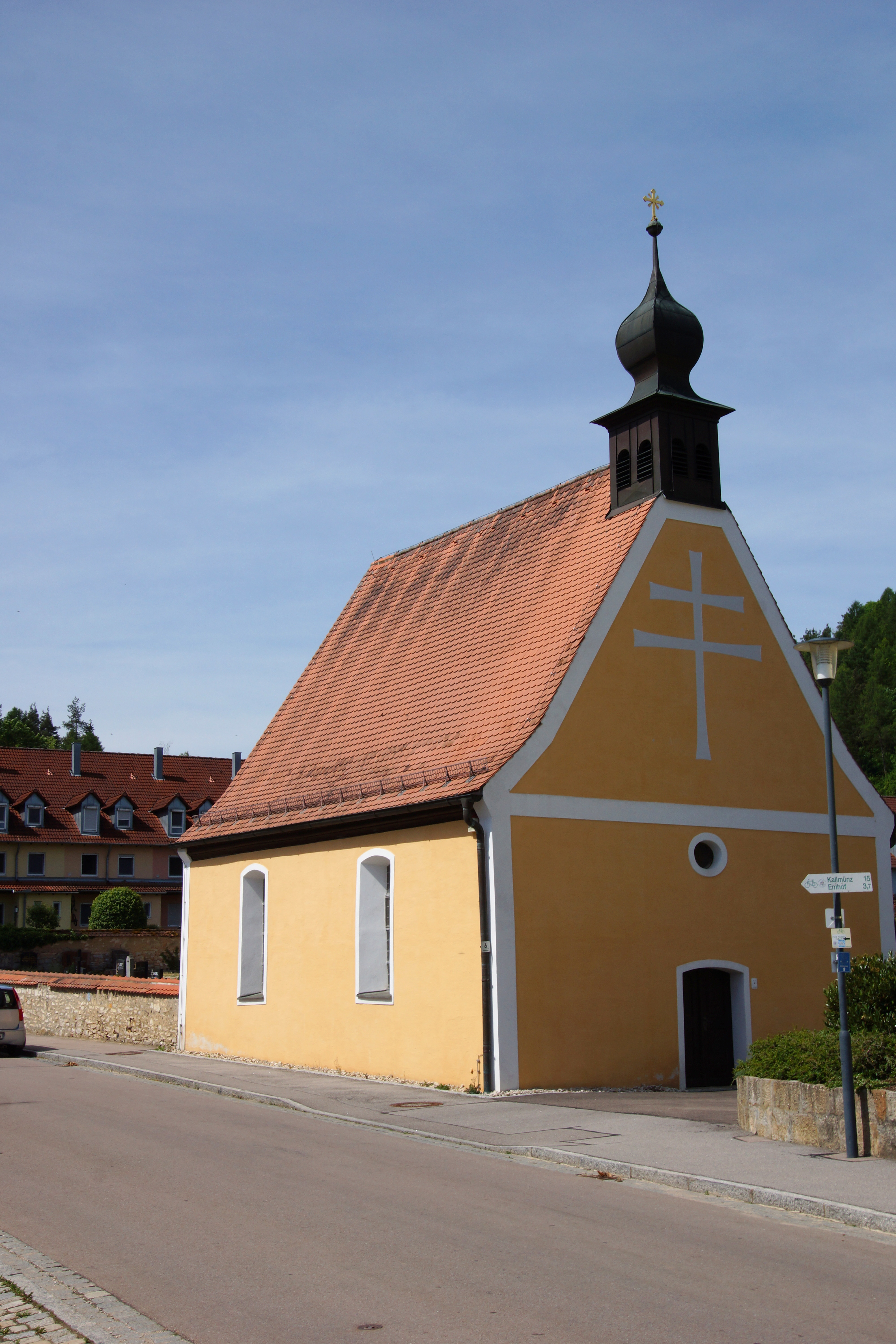 Die Friedhofskirche St. Georg in Schmidmühlen in der Oberpfalz